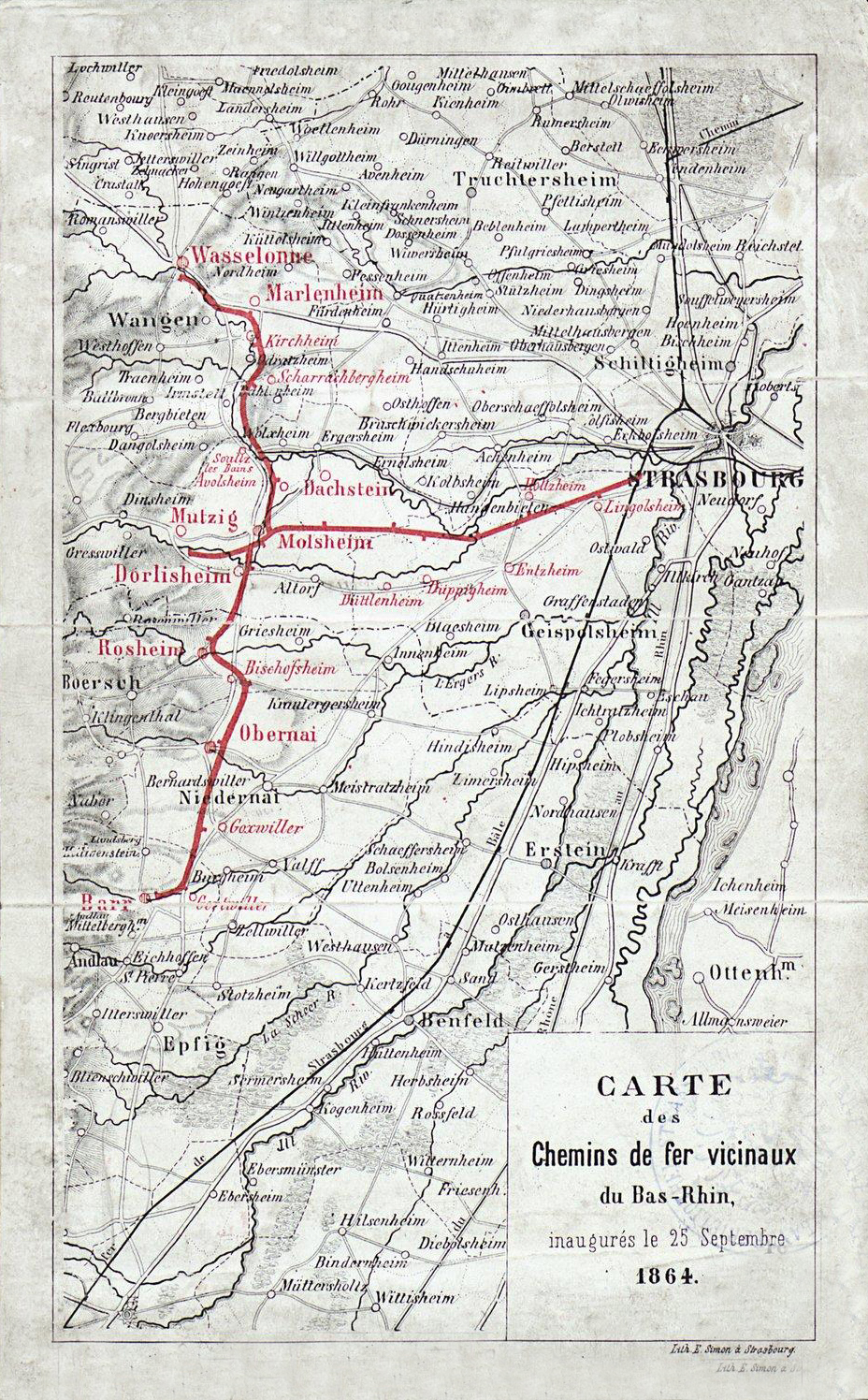 Carte des chemins de fer vicinaux du Bas-Rhin inaugurés le 25 septembre 1864, Lithographie du cartographe Frédéric-Emile Simon (1805-1886)